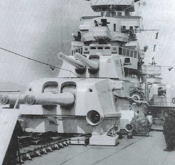 Olasz cirkáló lövegtornyai.